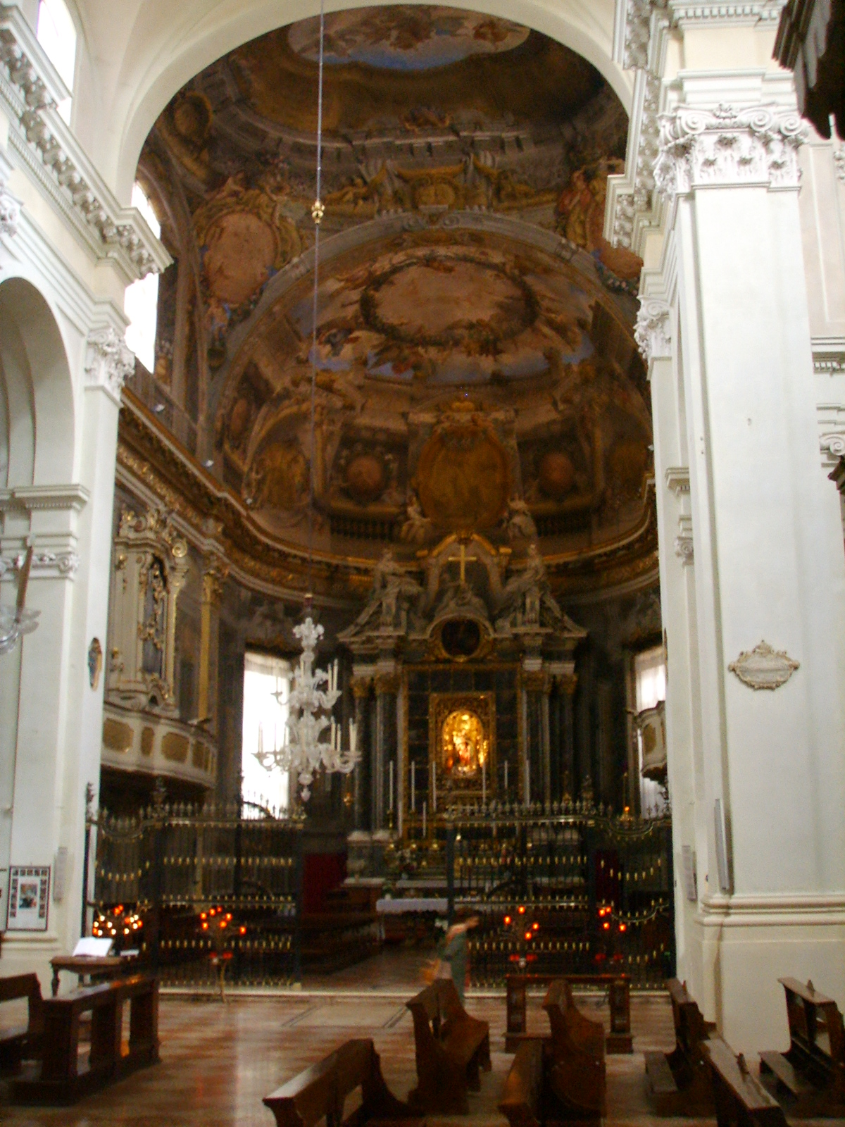 Bologna, san domenico, interno